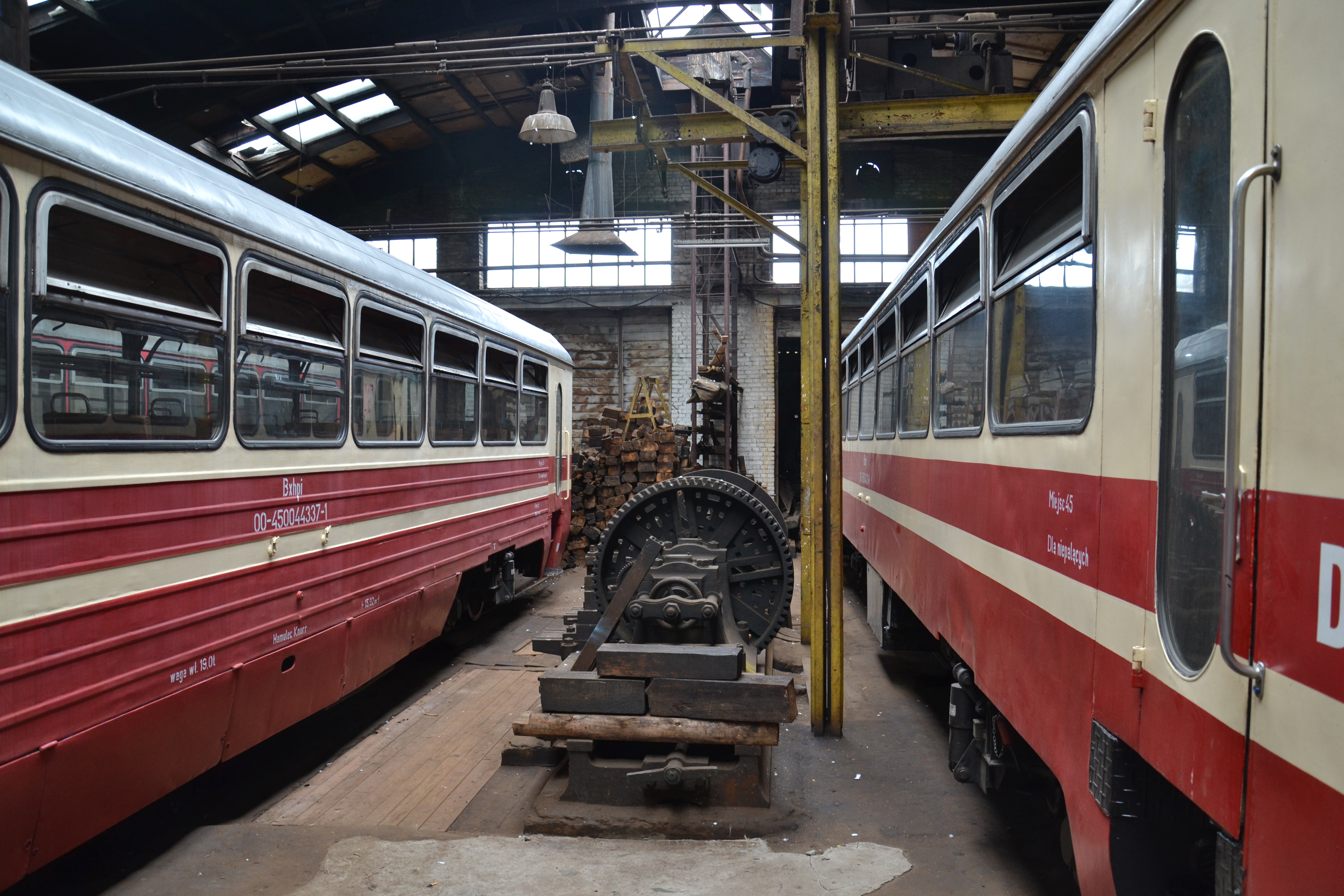 Wnętrze lokomotywowni w Piasecznie This photo was taken during Railway Wikiexpedition 2015 set up by Wikimedia Polska Association in cooperation with Fundacja Grupy PKP. You can see all photographs in category Wikiekspedycja kolejowa 2015.